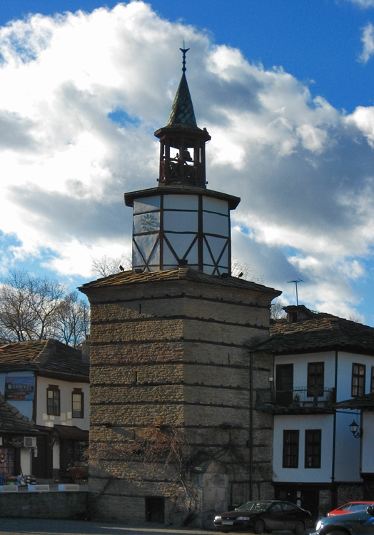 Часовниковата кула-Трявна